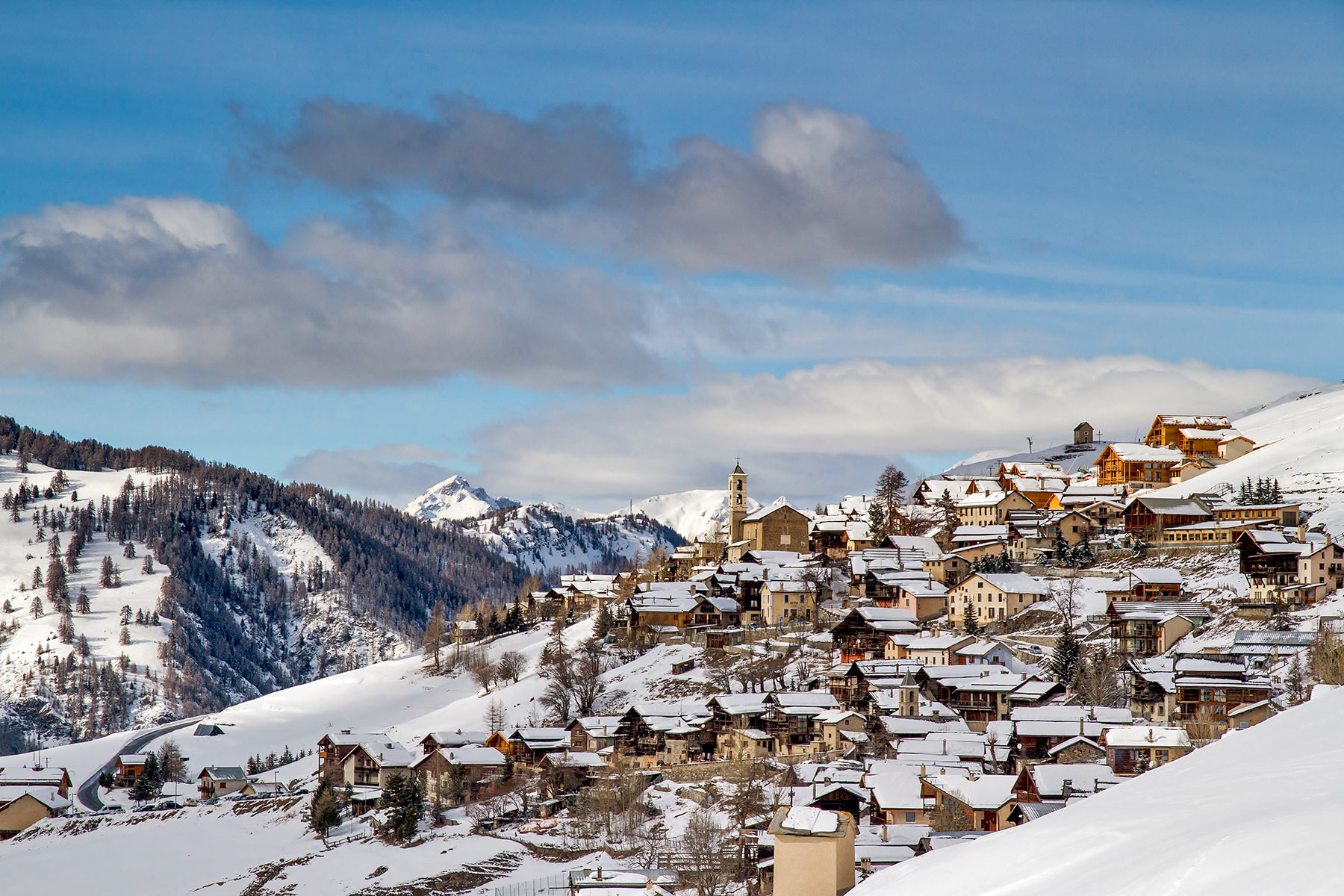 La commune la plus haute d'Europe, Saint-Véran en hiver - Altitude 2040 m.